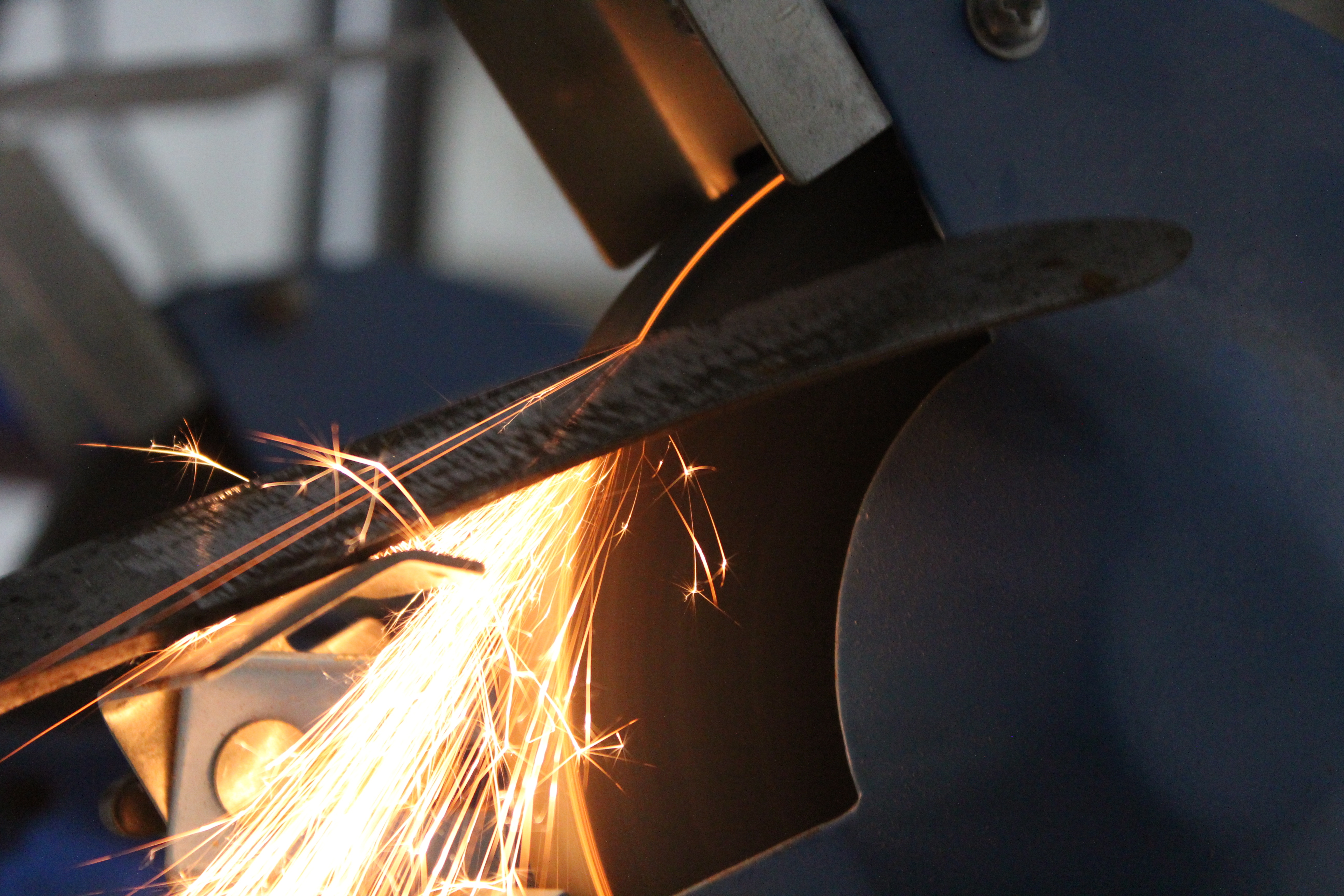 Funkenflug beim Schleifen eines Messers am Schleifstein